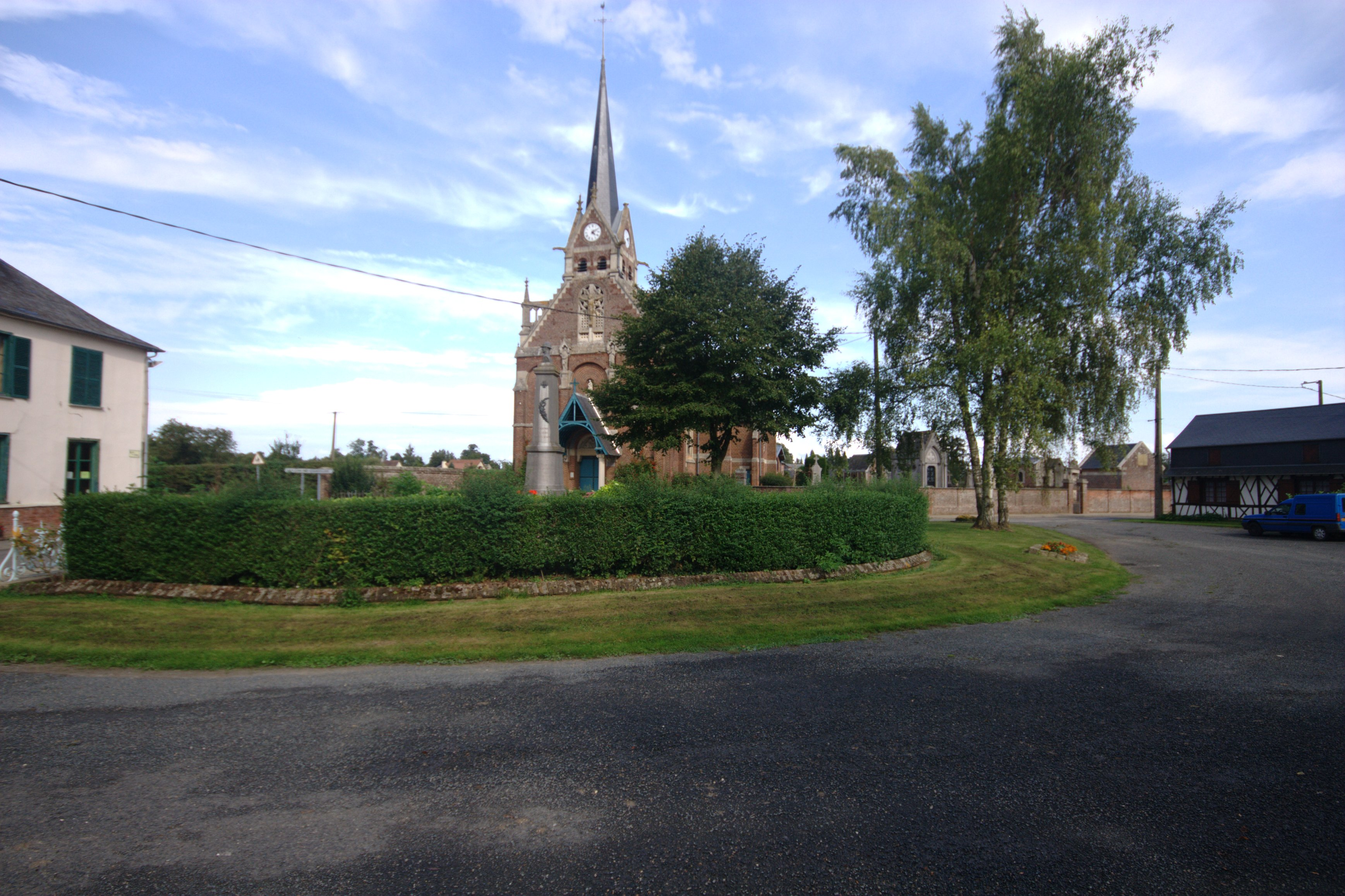 Die Kirche Sainte-Marie-Madeleine in Equennes-Eramecourt